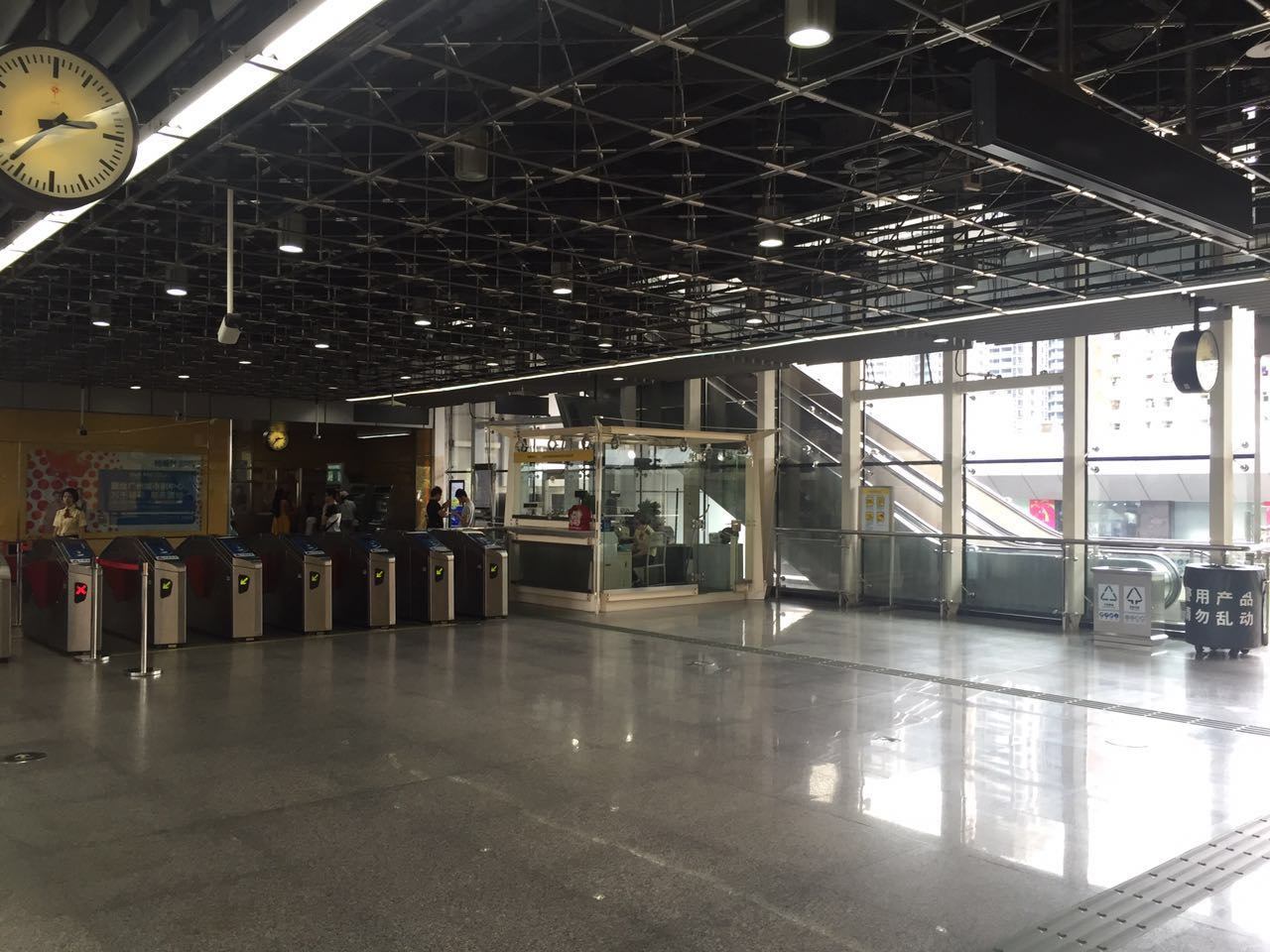 广州地铁金洲站